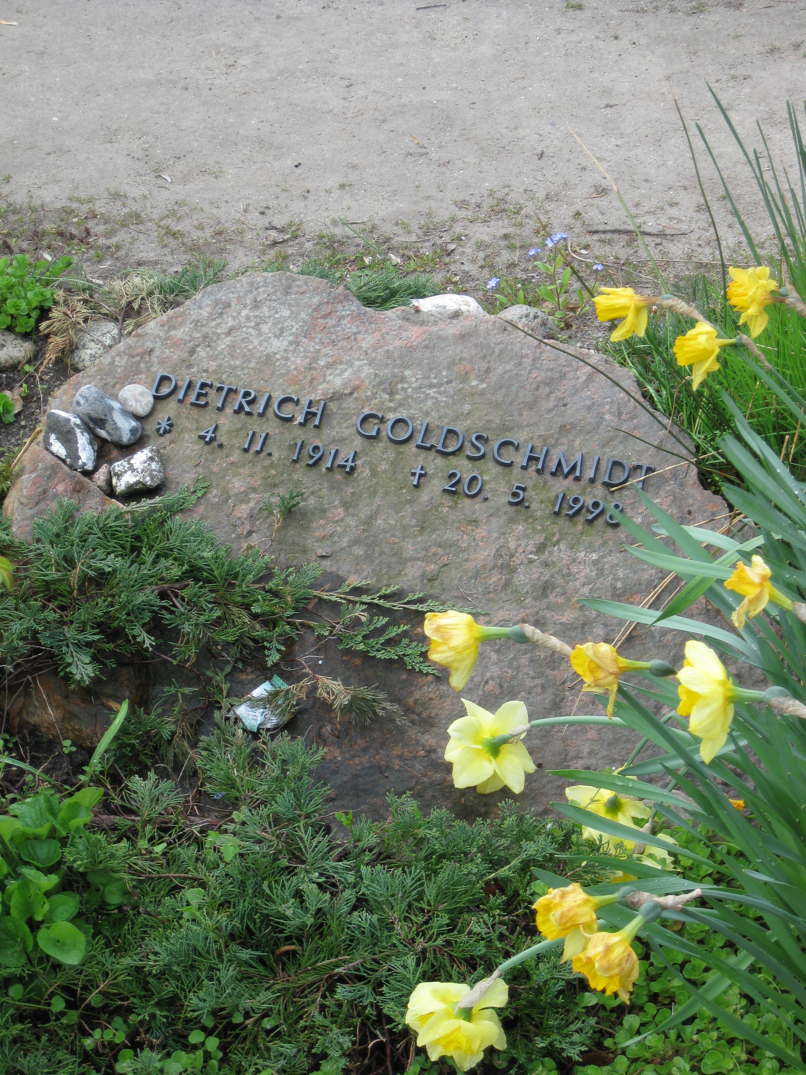 Grabstein St.Annen-Friedhof Dahlem, Grab des Soziologen und Bildungsforschers Dietrich Goldschmidt, MPI für Bildungsforschung